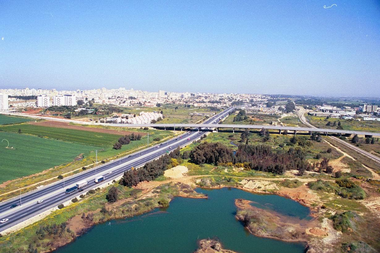 בניית גשר האחדות המחבר בין מזרח נתניה למערבה ליד כפר עידוד